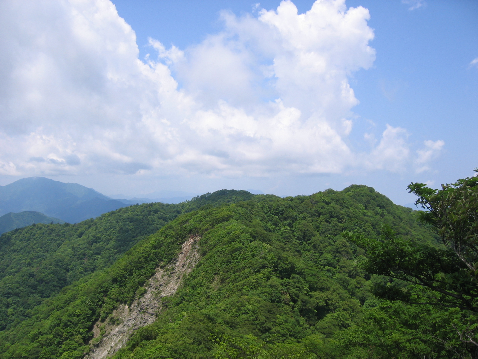 破風口付近から加入道山